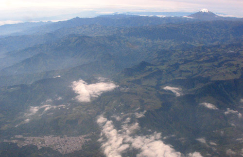 Vista de la ciudad del Libano, Tolima, Colombia, con el Nevado del Tolima al fondo.